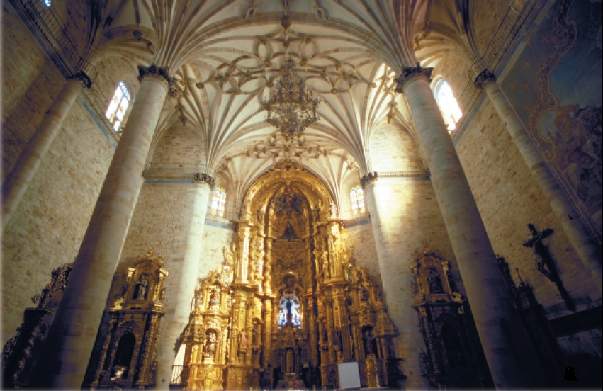 Sortzez Garbiaren barrualdea. Elorrio.